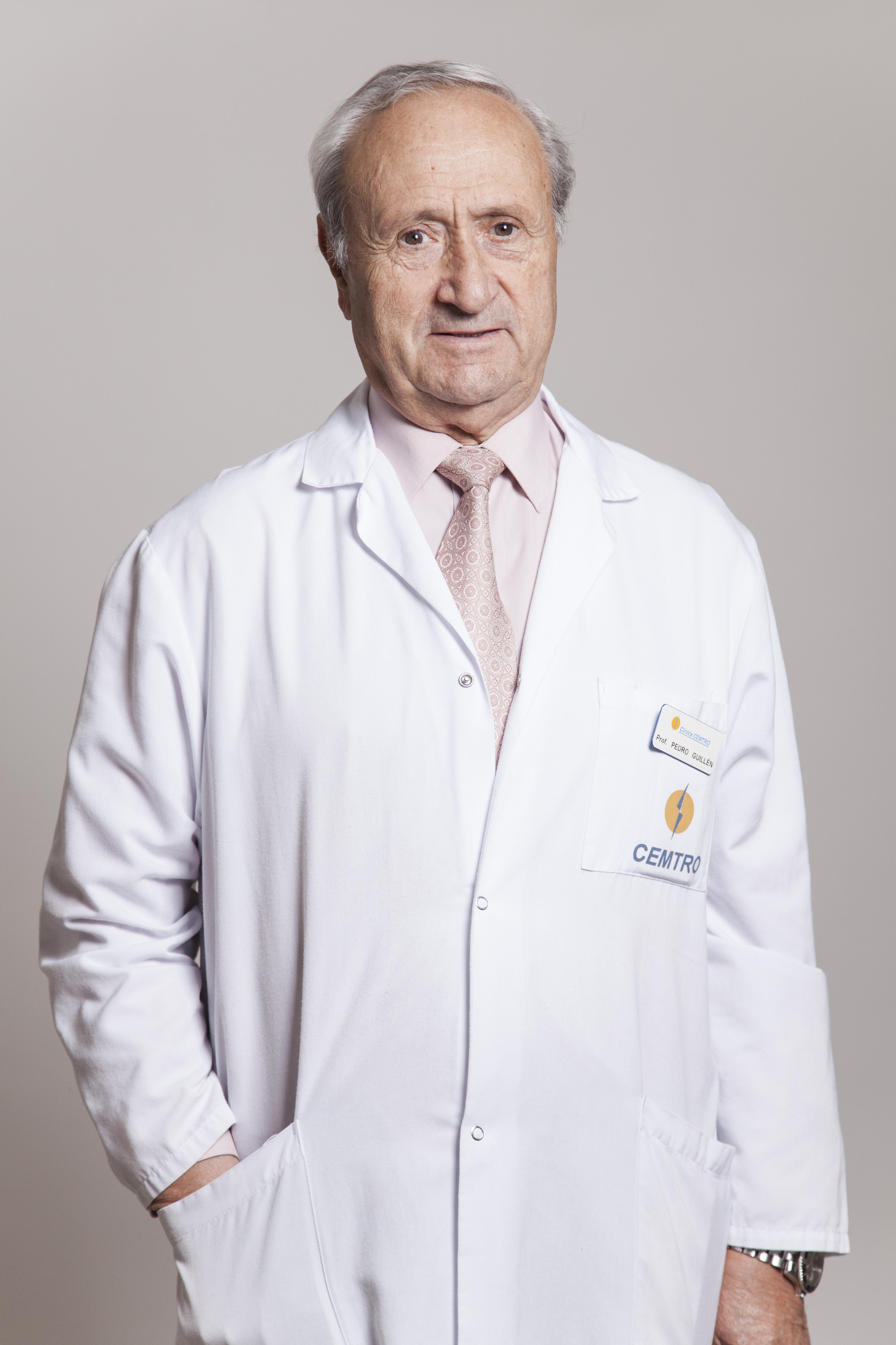 El Dr. Pedro Guillén García en la Clínica CEMTRO